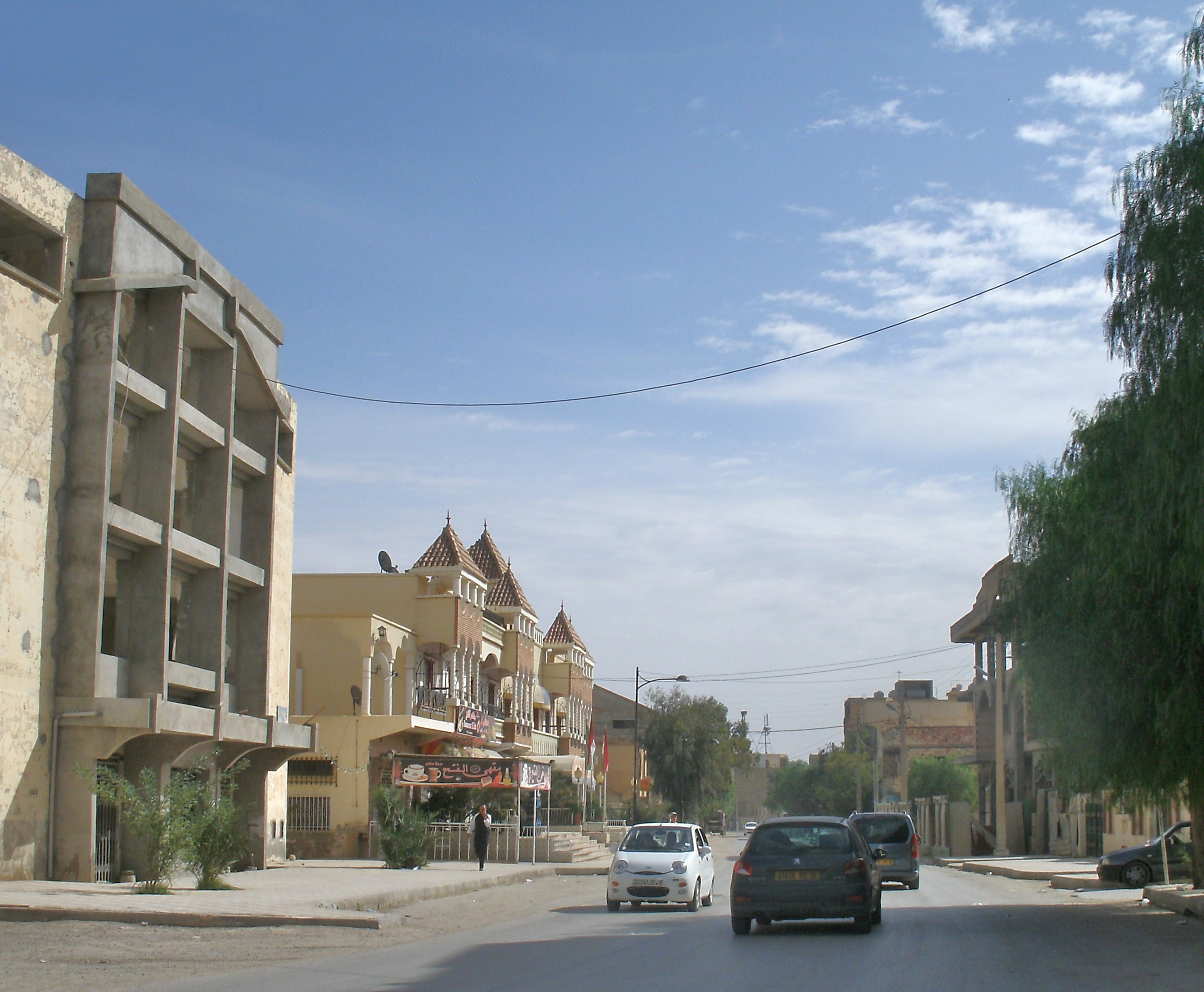 Rue principale de Sidi Aïssa